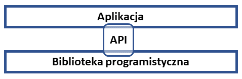 Plik dotyczy typowej architektury oprogramowania, gdzie aplikacja używa biblioteki programistycznej z użyciem interfejsu API. Dla aplikacji API jest jedynym punktem styku z biblioteką.